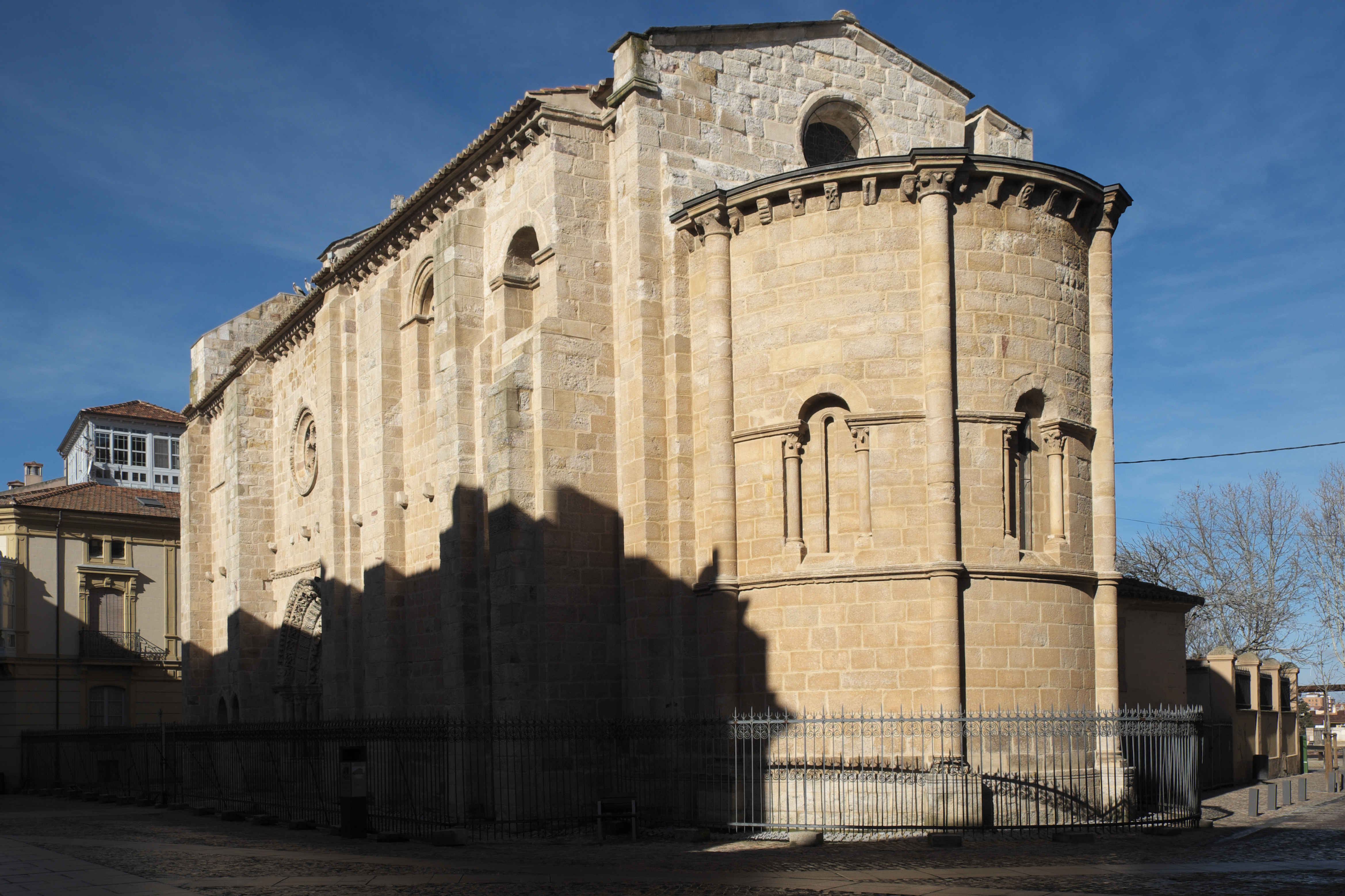 Kirche Santa María Magdalena in Zamora (Kastilien-León/Spanien)